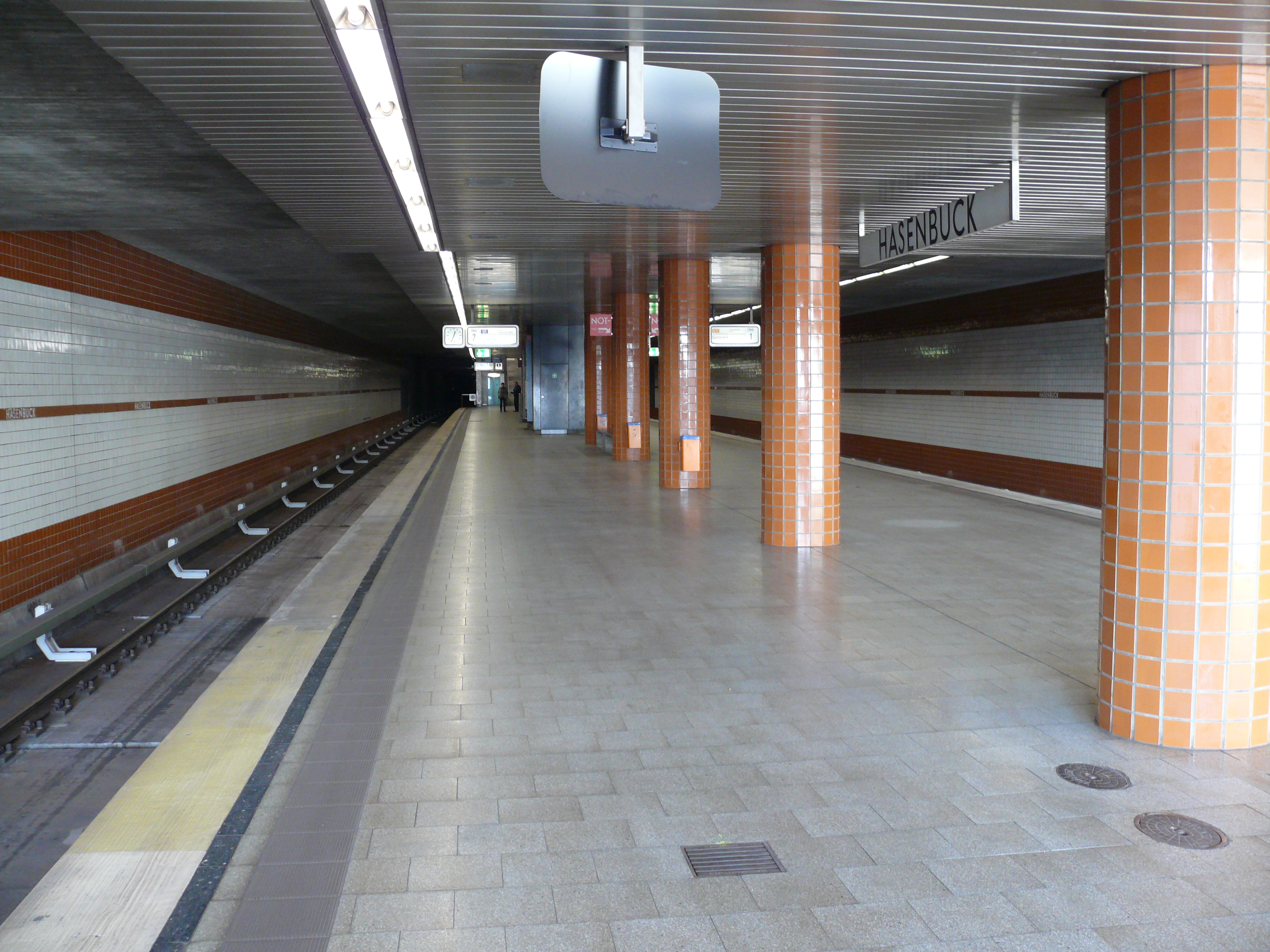 Bahnsteigebene am U-Bahnhof Hasenbuck in Nürnberg (Hier Gleis 2).